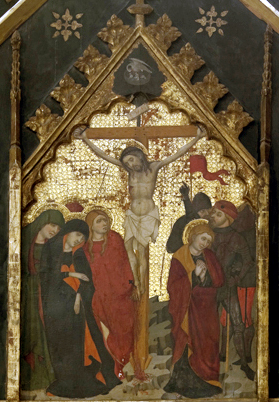 Crucifixión parte del ático del retablo del Espíritu Santo de Manresa. Siglo XIV